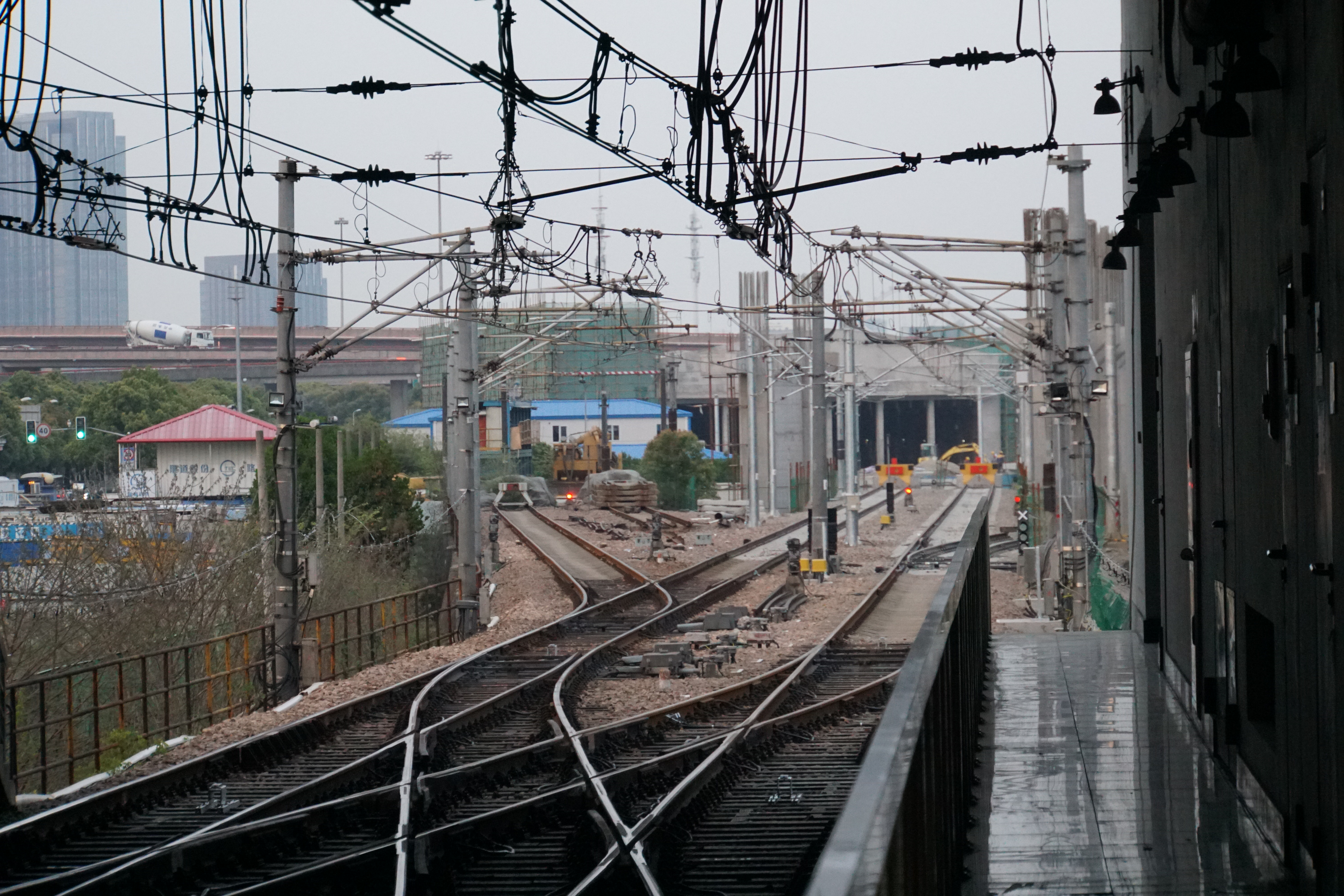 正在改建中的5号线折返段及建设中的莘庄辅助停车场